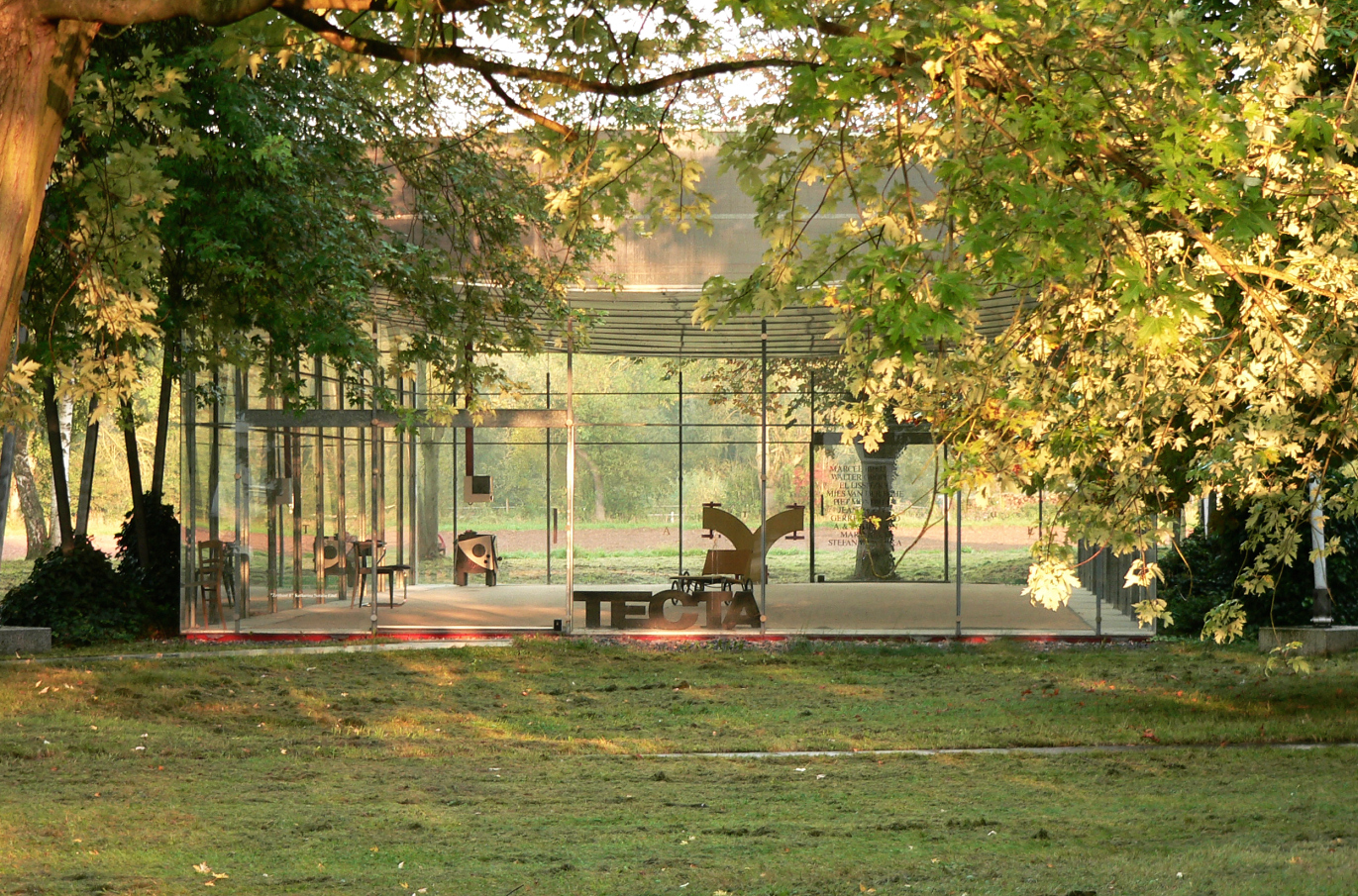 Ausstellungshalle auf dem Gelände von Texta, entworfen von Stefan Wewerka